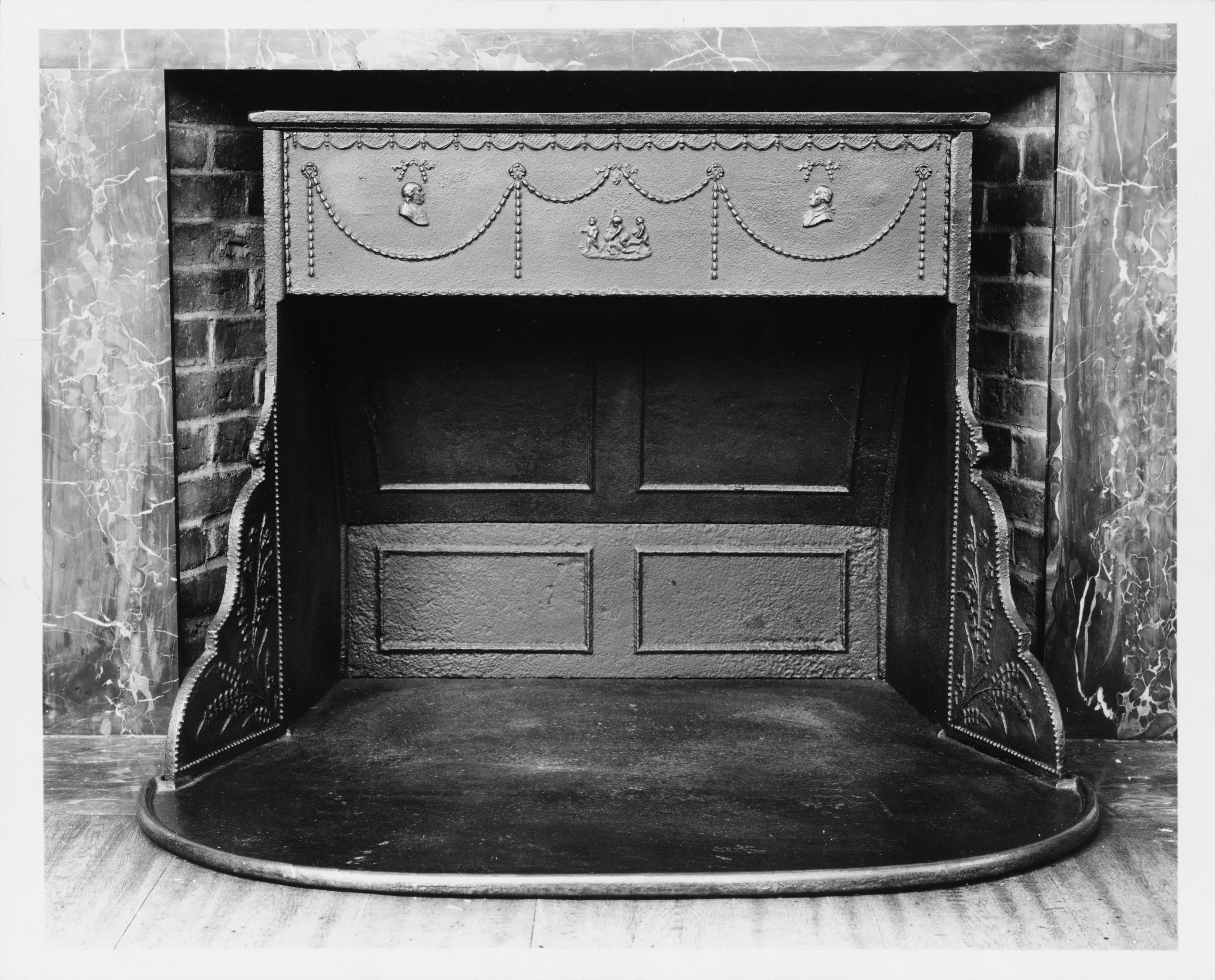 Franklin stove; Metal